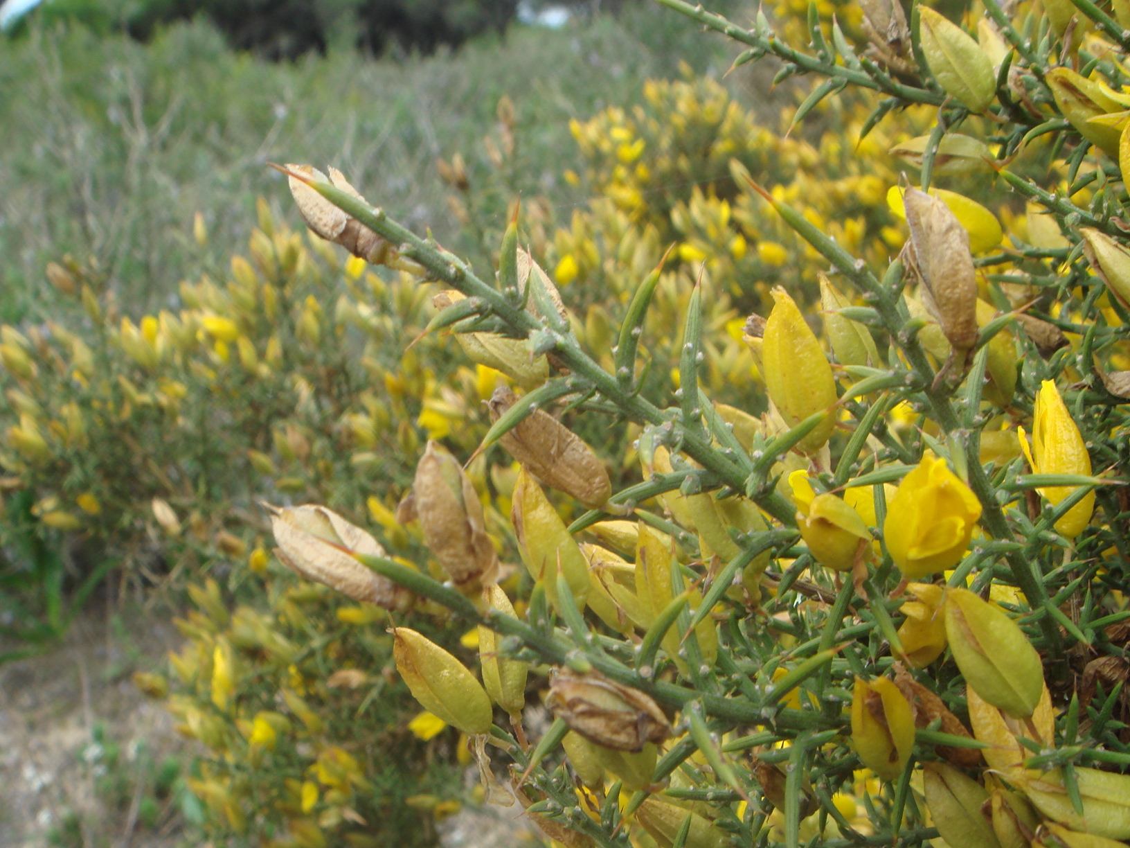 Ulex australis subsp. australis, Chiclana (Cádiz), España